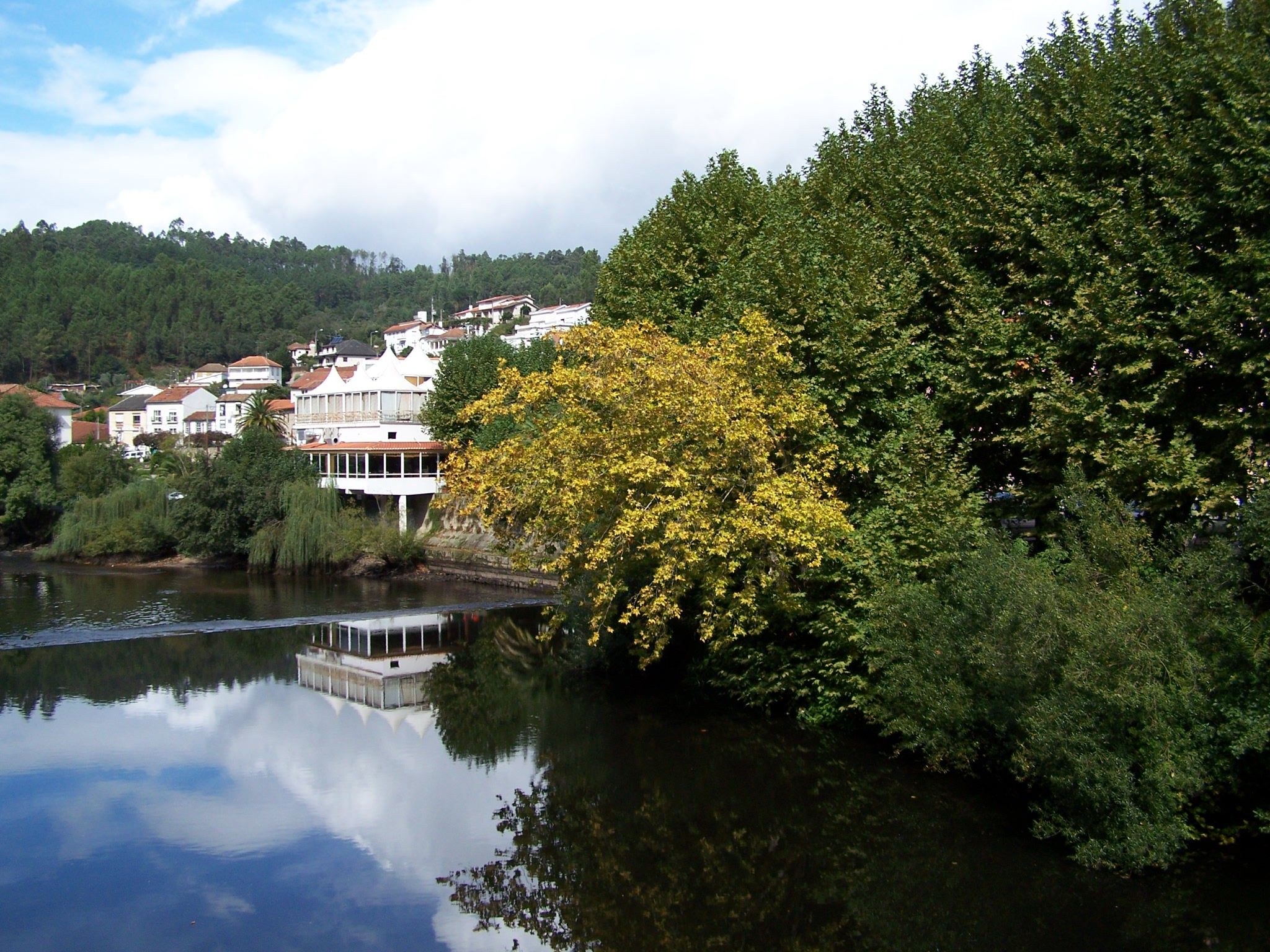 Termas de São Pedro do Sul, distrito de Viseu, Rio Vouga, Portugal.